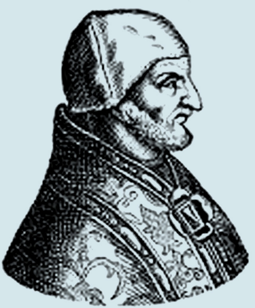 Innocent VI gravure XIXe s